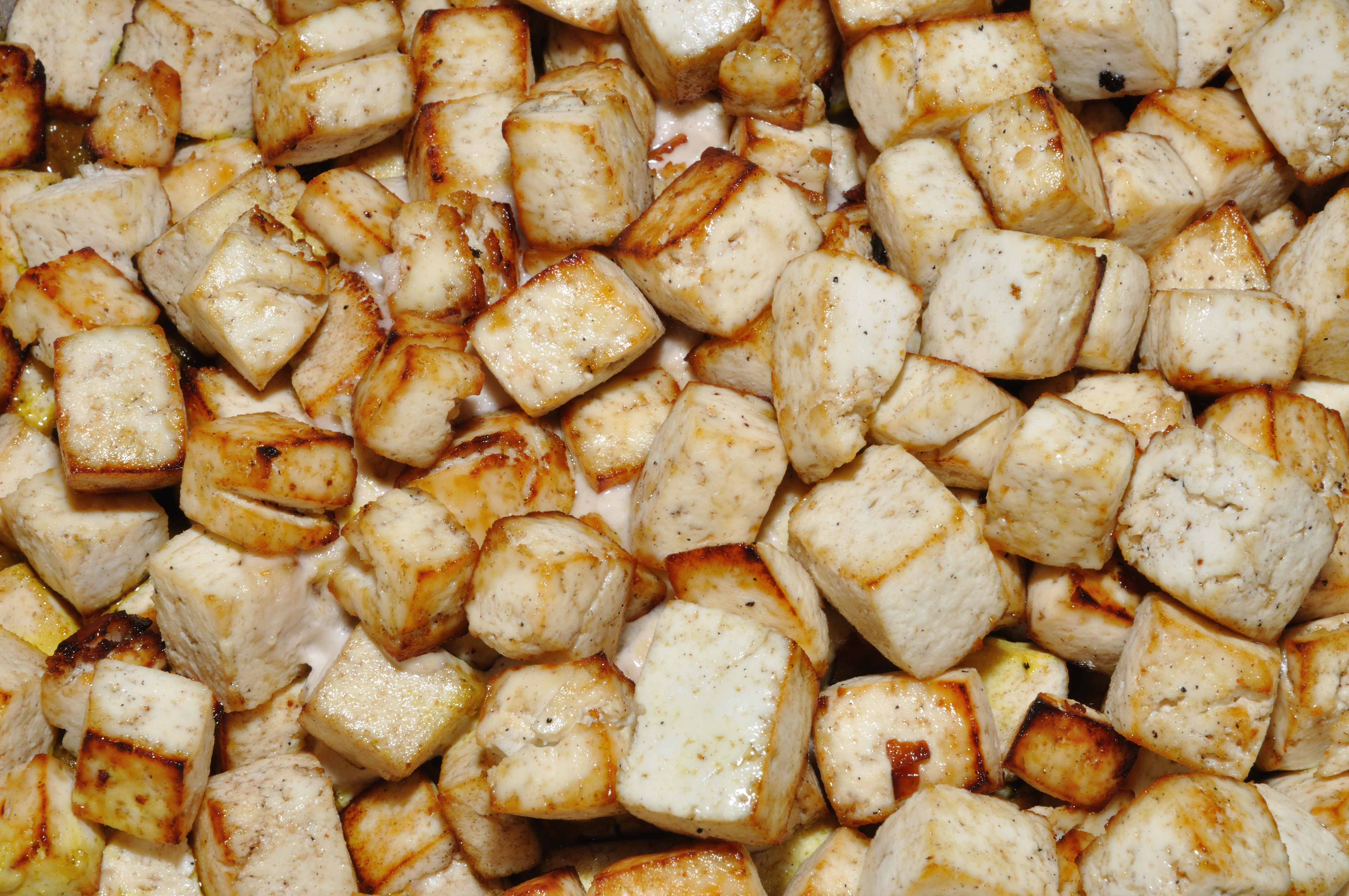 Fried paneer.